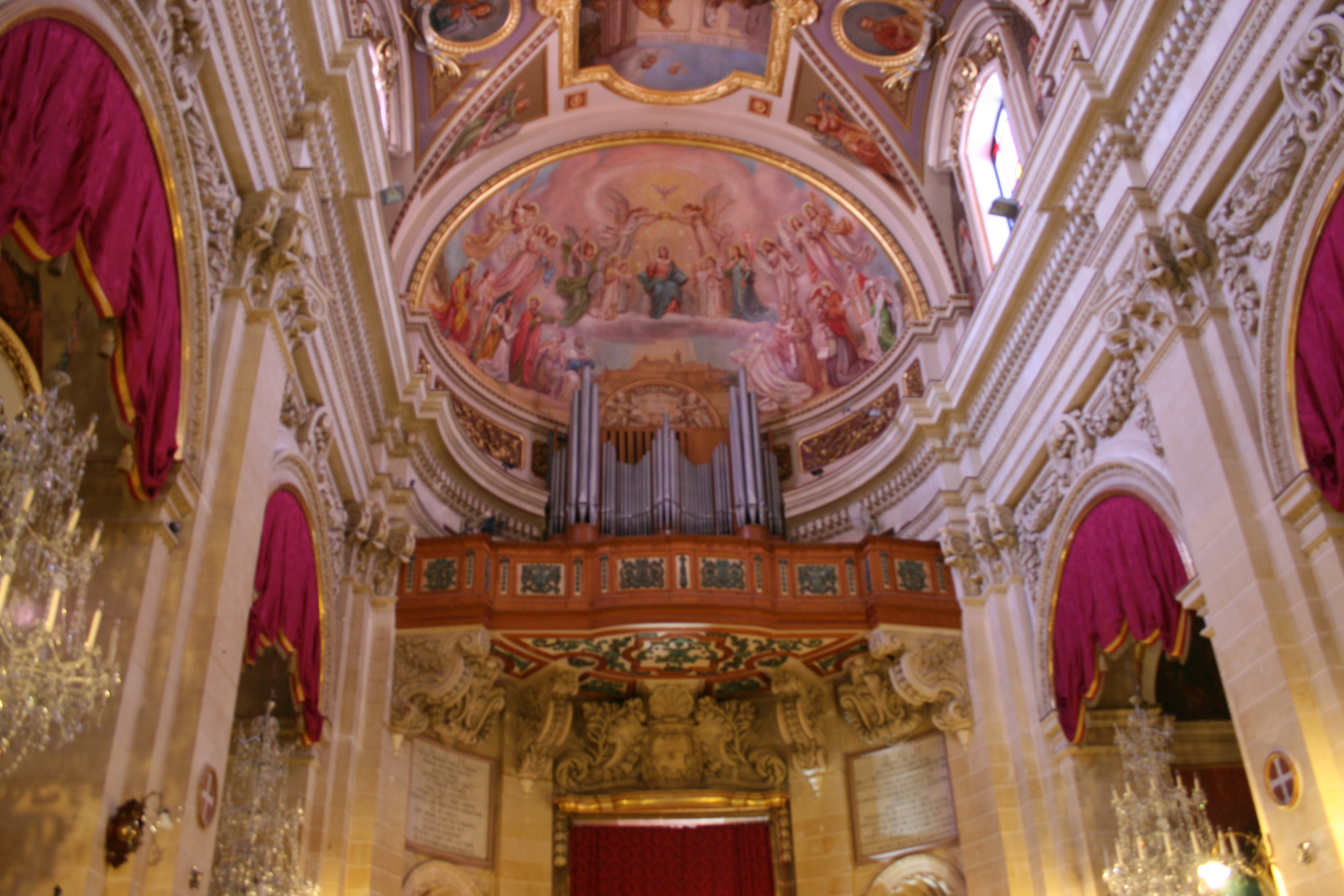 Orgel der Kathedrale Maria Himmelfahrt (Gozo)